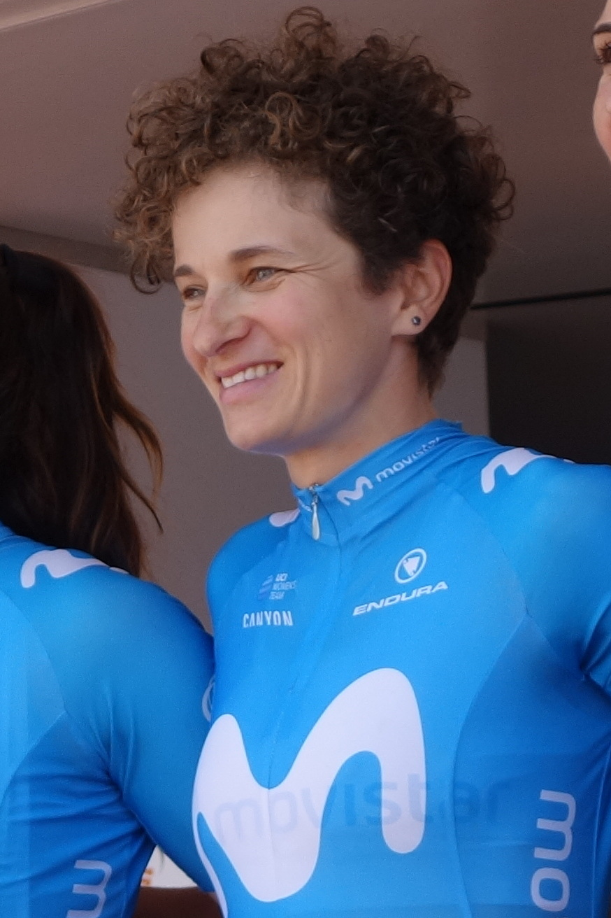 Małgorzata Jasińska (Movistar) bij de start van de eerste etappe van Stramproy naar Weert in de Boels Ladies Tour 2019